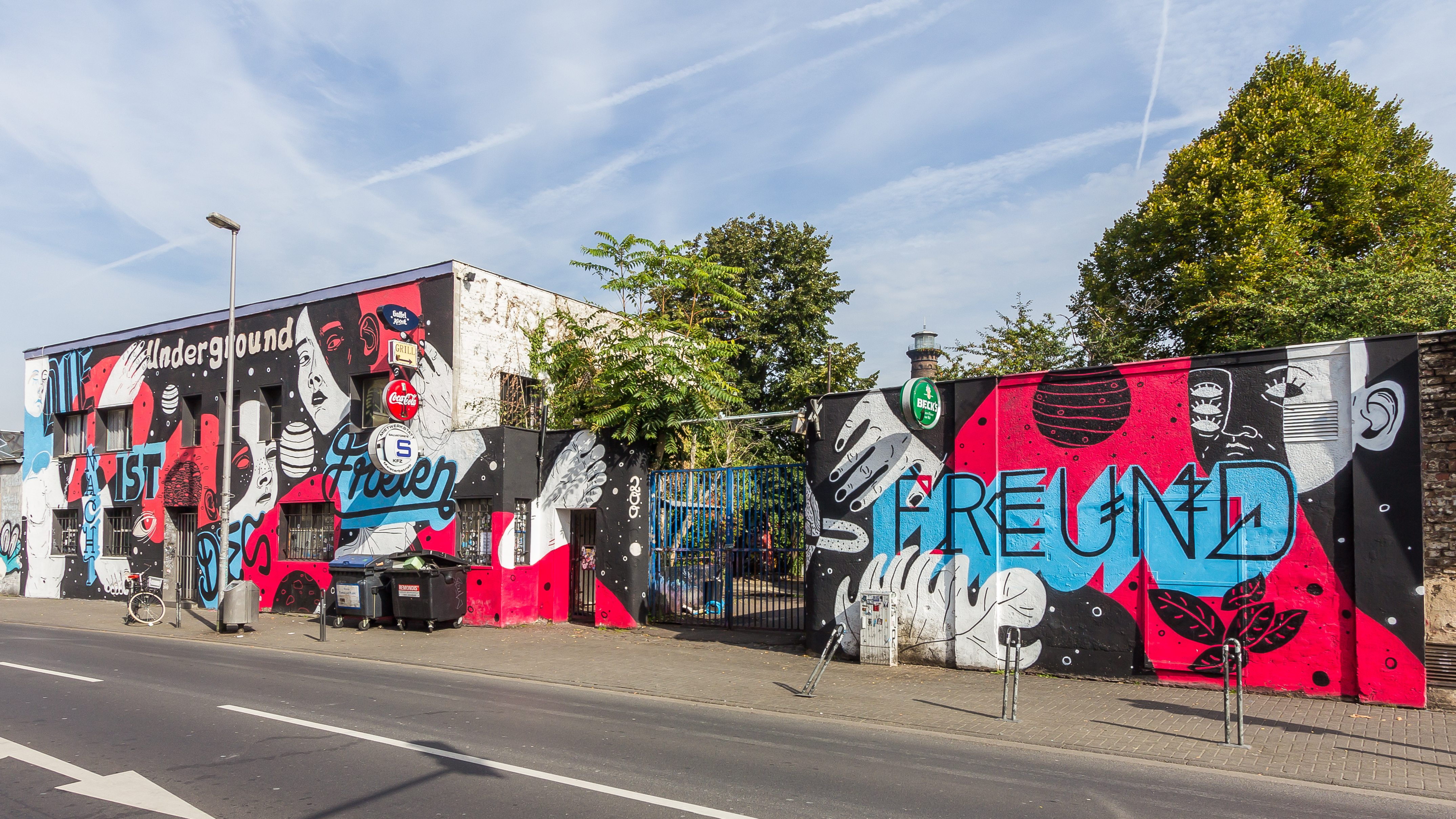 Underground Cologne 2017